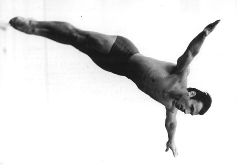 Rolf Sperling Zentralbild Kluge Sche 17.8.1968 Leipzig: Deutsche Meisterschaften der DDR im Wasserspringen- Sieg für Rolf Sperling (16.8.1968) Einen überragenden Sieg sah sie Entscheidung im Kunstspringen der Herren. Der Berliner Arzt Rolf Sperling (TSC) meisterte als einziger den anderthalbfachen Salto vorwärts mit dreifacher Schraube, den "schwersten Sprung der Welt" (mit der Schwierigkeit 2,9), in überzeugender MAnier. Er erreichte die hervorragende Note von 476,40 Punkten. Sperling gilt ebenfalls als favorit für das Turmspringen.